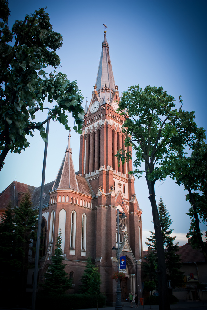 arad - biserica luterana (2)